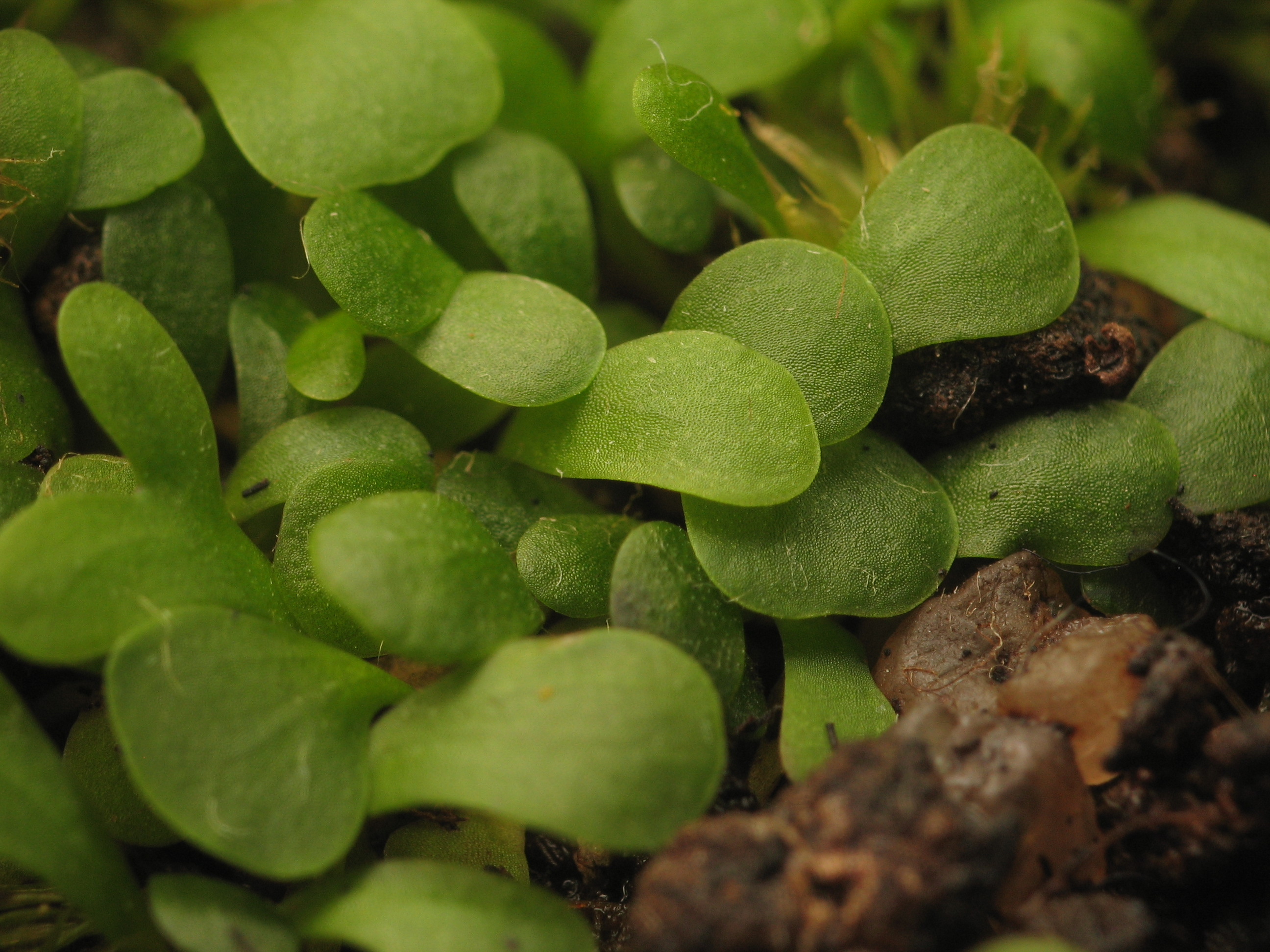 Utricularia livida growing in culture